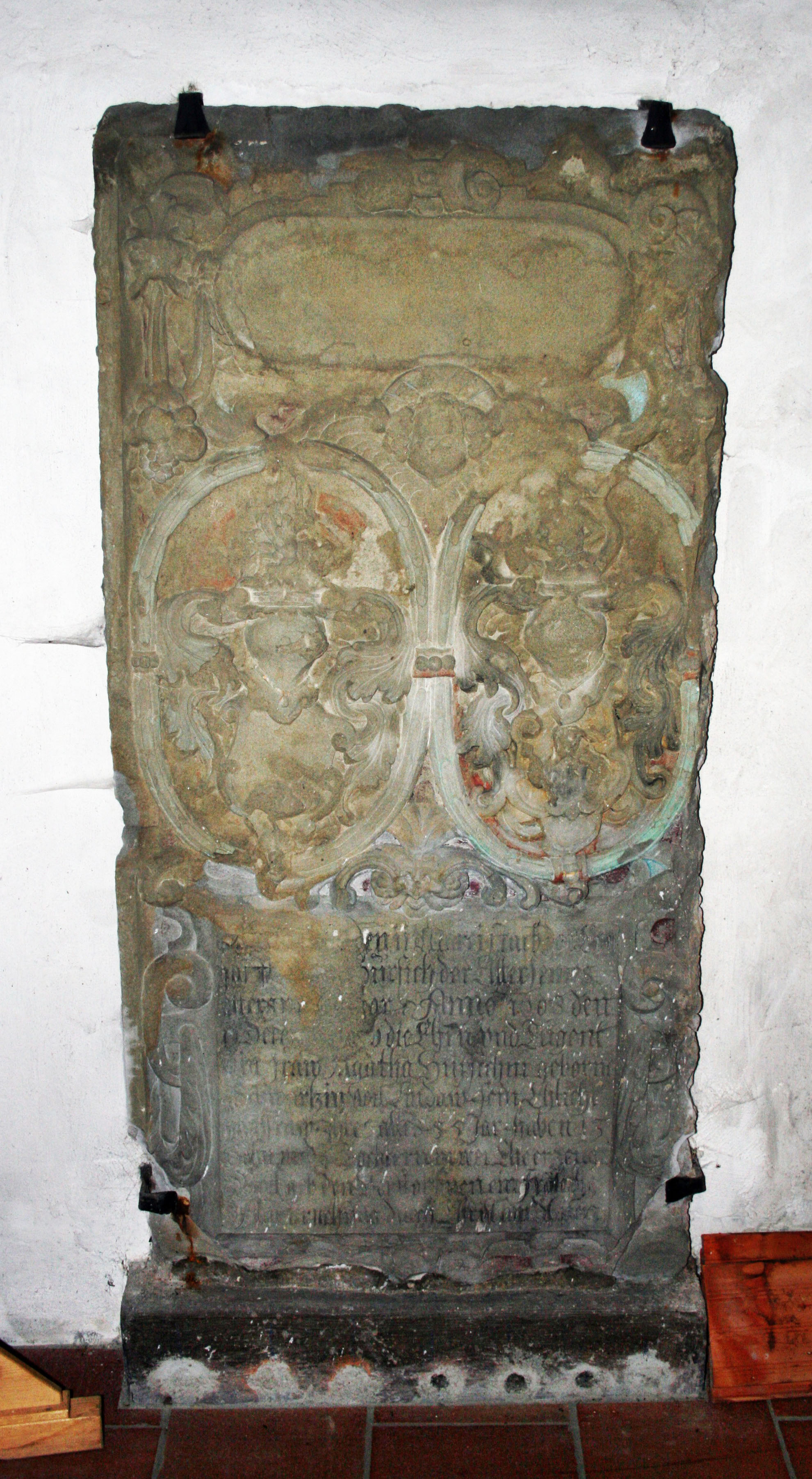 Unser Frauen (Memmingen), Epitaph des Memminger Handelsherrn und Patrizier Jörg Hürsich und seiner Ehefrau von 1606/1608 an der Nordostecke des nördlichen Seitenschiffes.